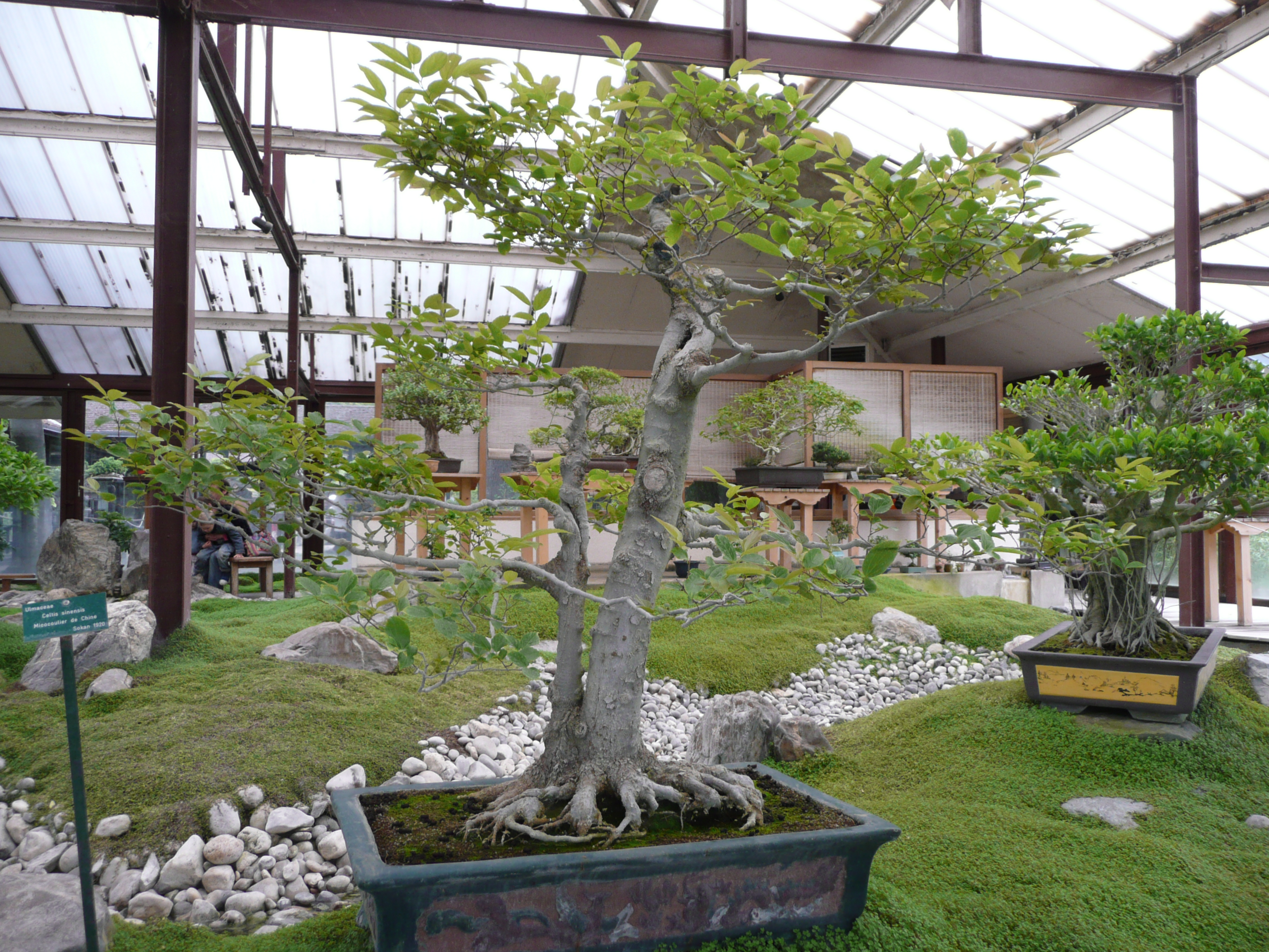 Celtis sinensis Bonzai in Serre des bonsaïs in Parc floral de Paris Map: 48° 50' 19" N 2° 26' 33" E